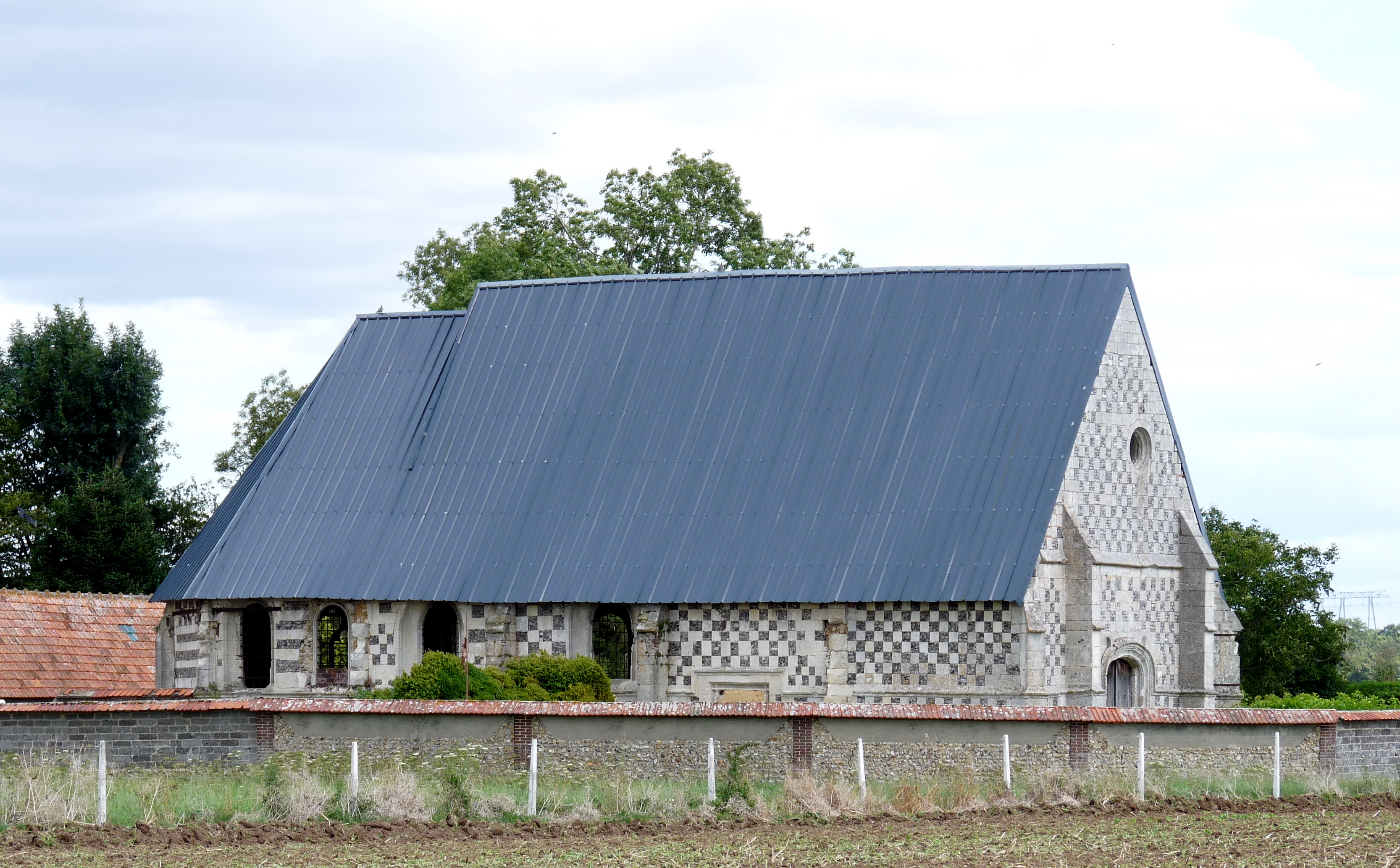 Ancienne église Notre-Dame du Mesnil-Hardray.